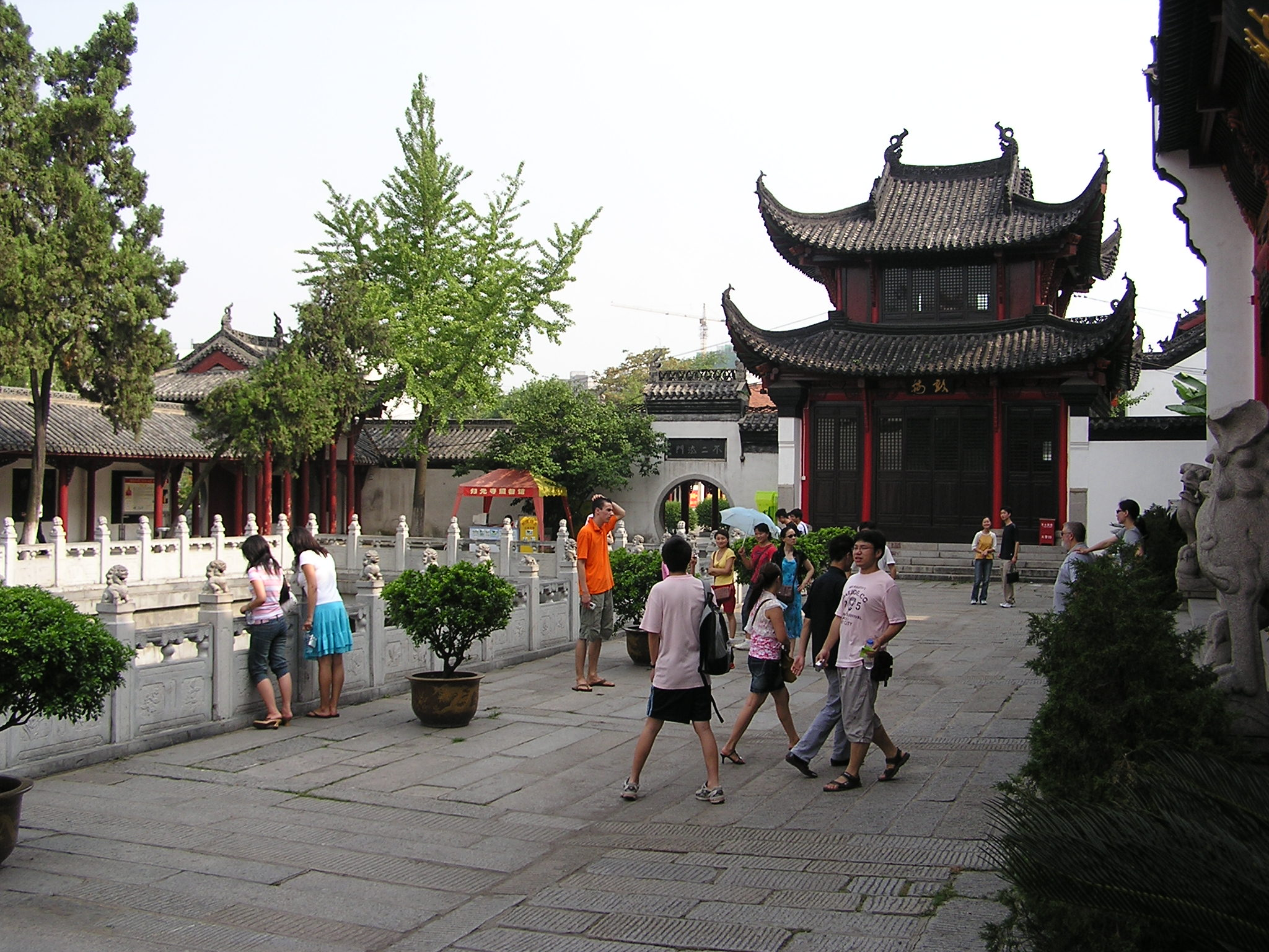 Buddhistischer Guiyuan Tempel in Wuhan - Buddhist Guiyuan Temple in Wuhan